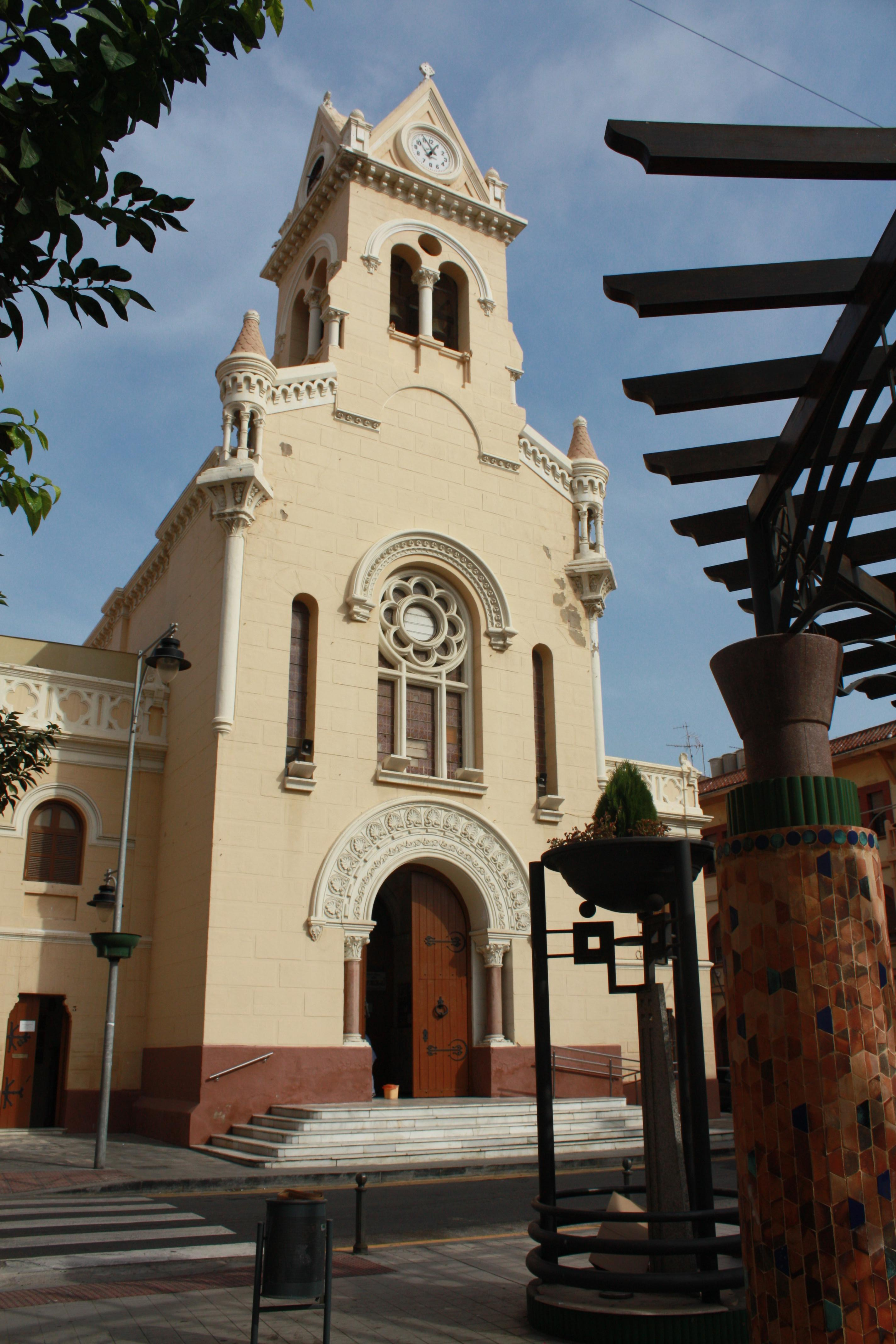 Iglesia del Sagrado Corazón